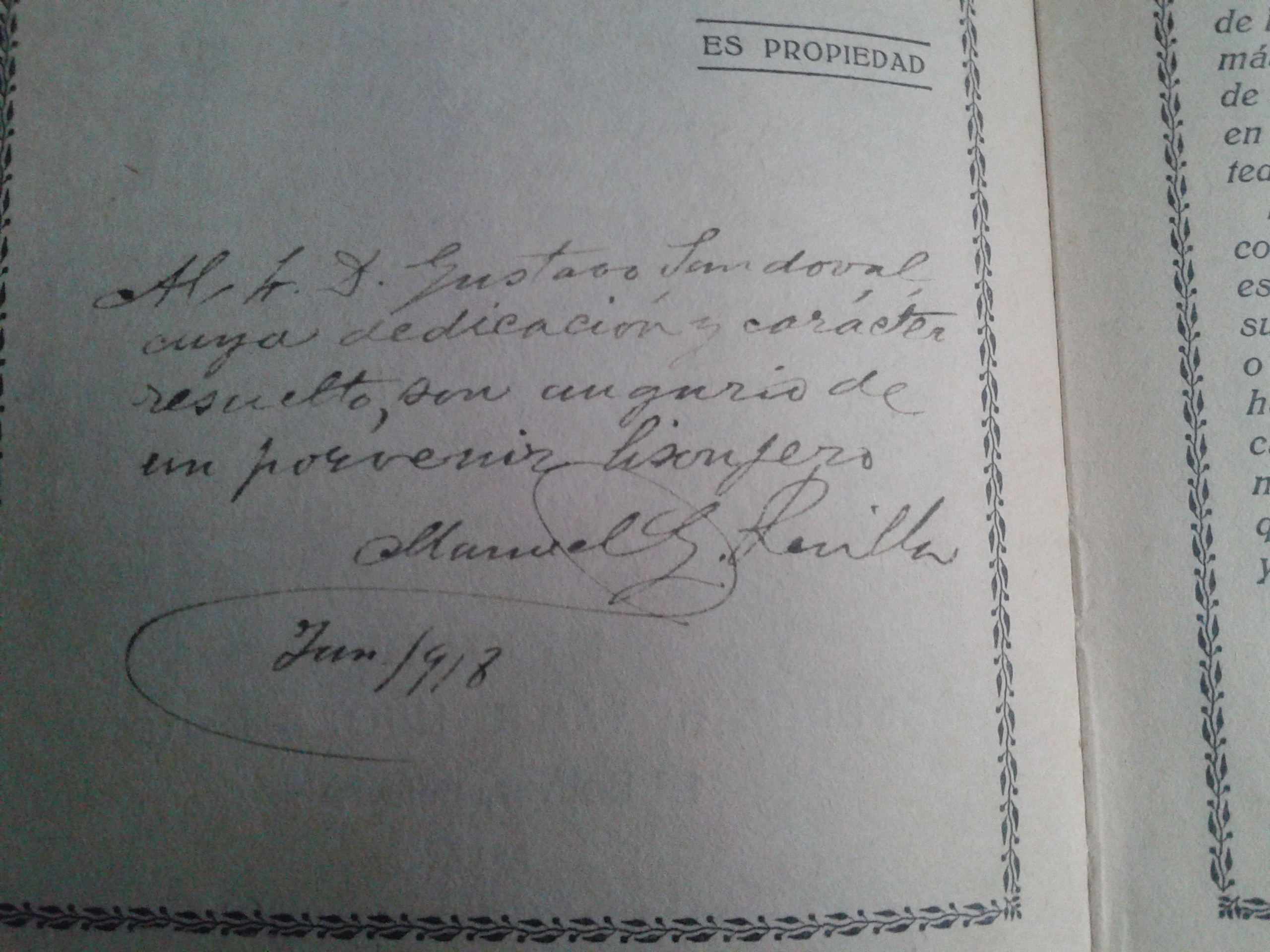 Firma autógrafa de Manuel G. Revilla, en "En pro del casticismo" (México: Andrés Botas e Hijo, 1917), en la dedicatoria a un alumno suyo.